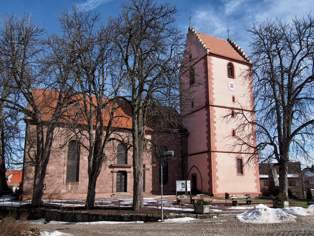 Alte St.-Laurentius-Kirche Sulgen außen